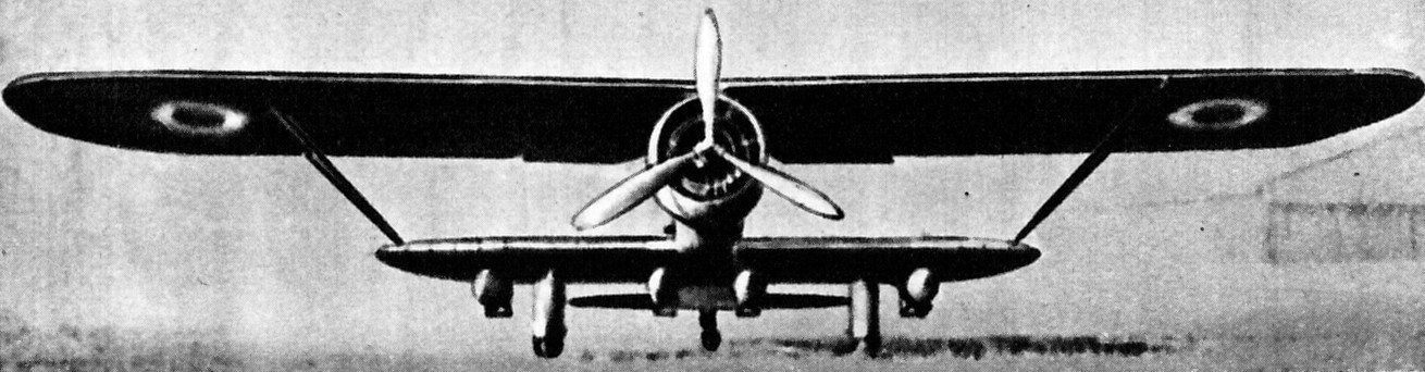 Francuski samolot rozpoznawczy Breguet 273.